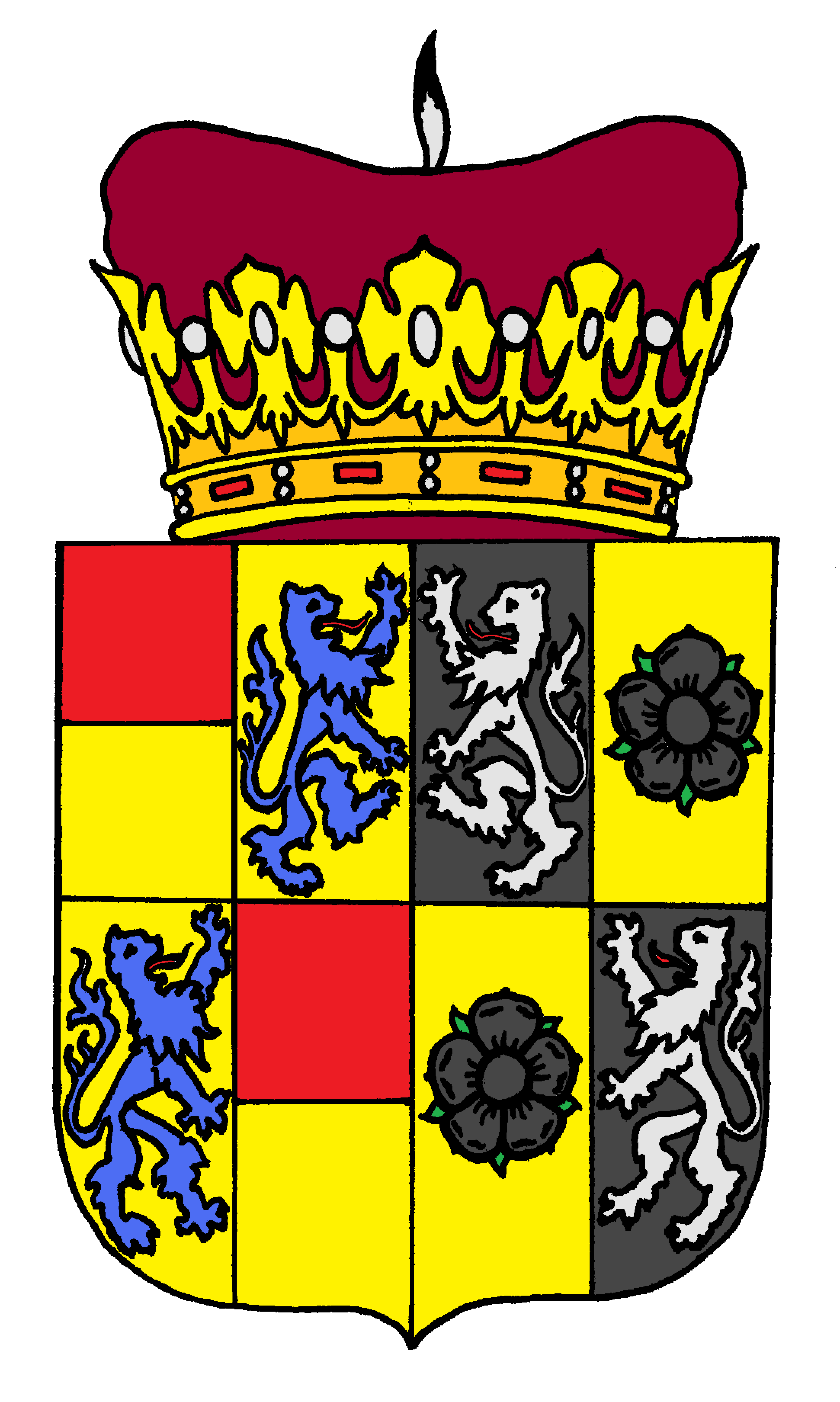 Wappen der erlauchten Grafen von Solms-Wildenfels / von Solms-Baruth